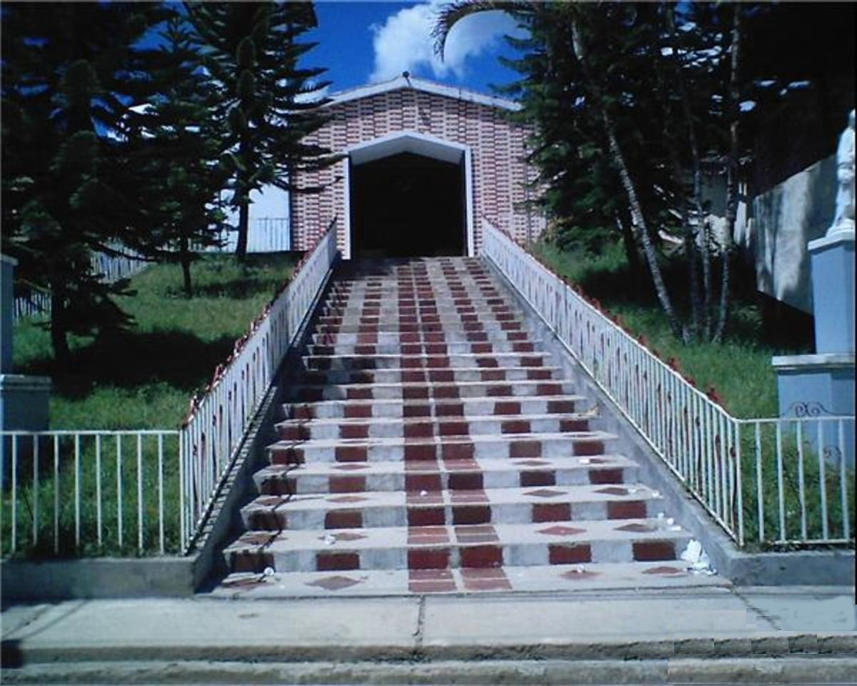 Atrio Iglesia de Herrera, Tolima, Colombia